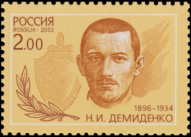 Н. И. Демиденко.